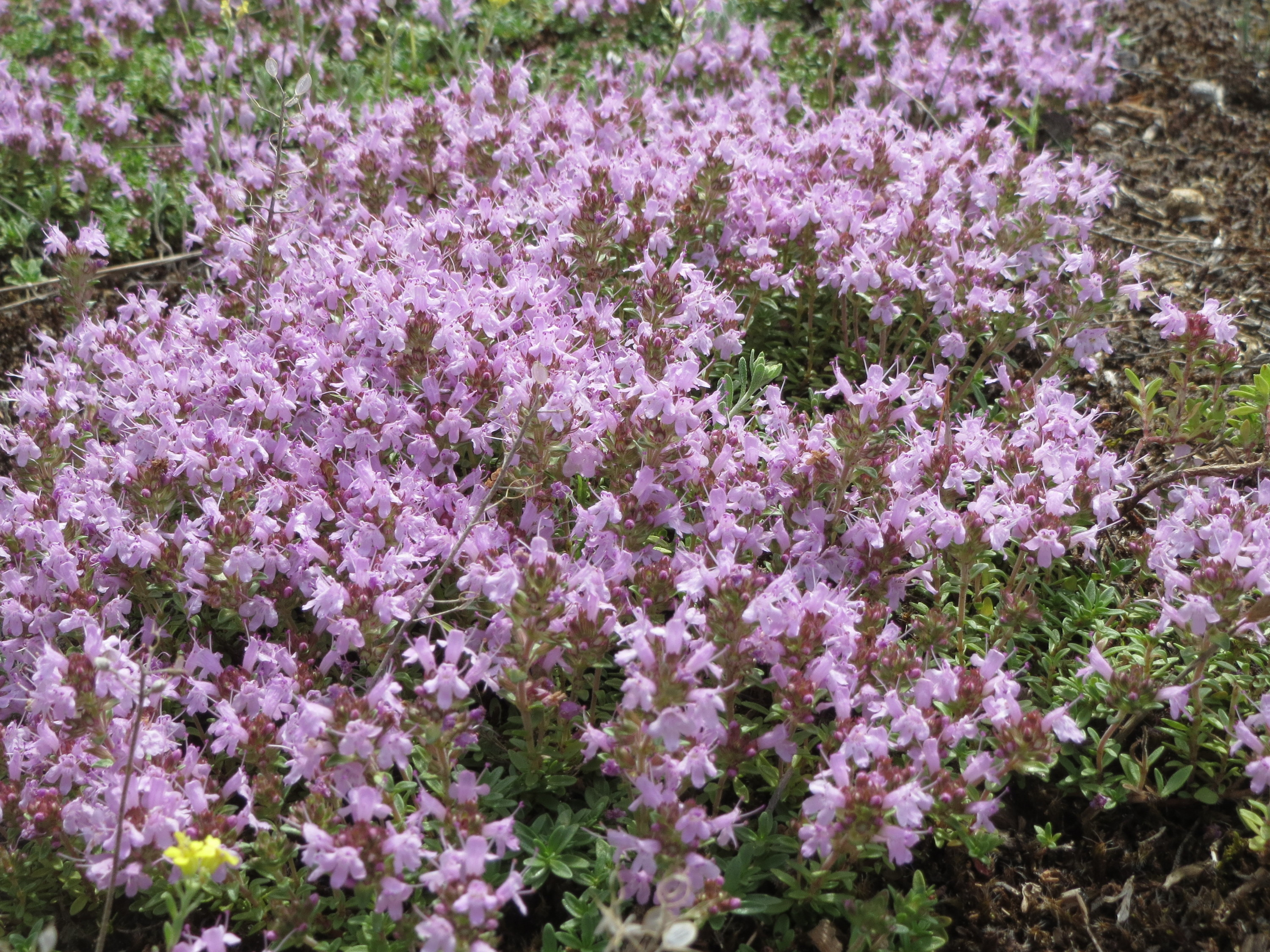 Sand-Thymian (Thymus serpyllum) im Mainzer Sand